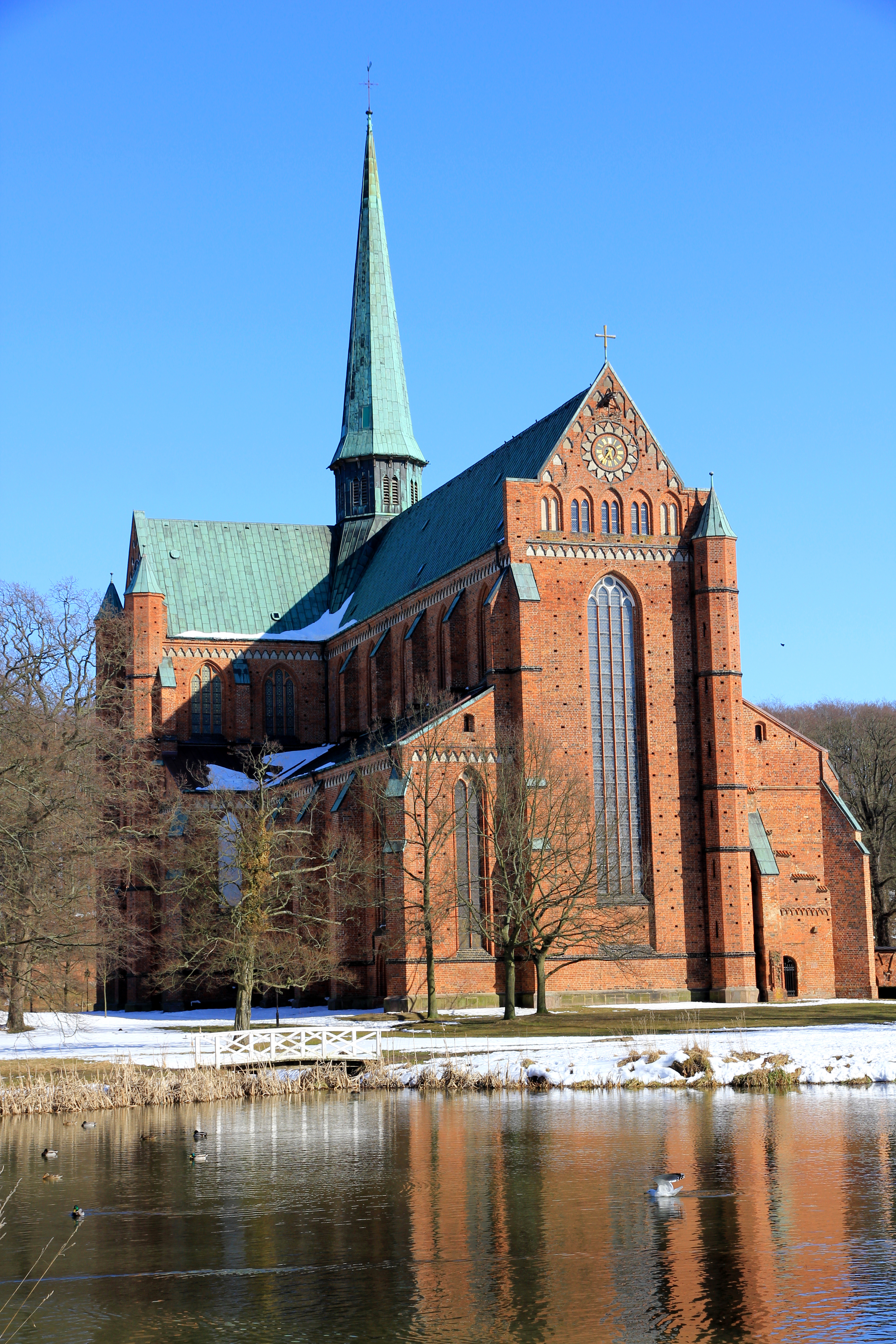 Münster Bad Doberan (Ansicht von Westen)